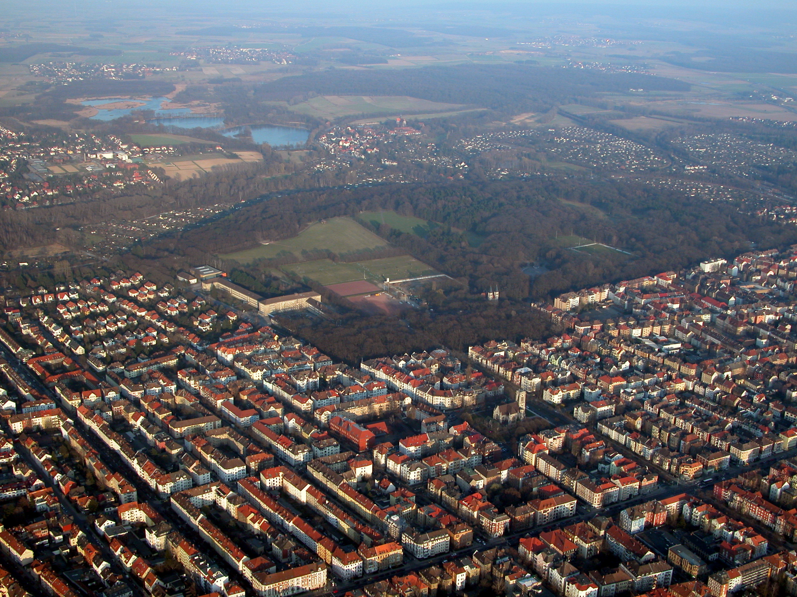 Braunschweig: Blick über das östliche Ringgebiet. Im Zentrum der Prinzenpark mit dem Nußberg. In Hintergrund Riddagshausen mit Kreuzteich, Mittelteich und Schapenbruchteich (Blickrichtung Südosten).